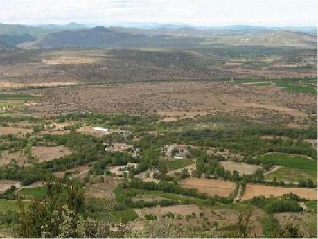 Pompignan (Gard) vu depuis le Mont Saint Jean